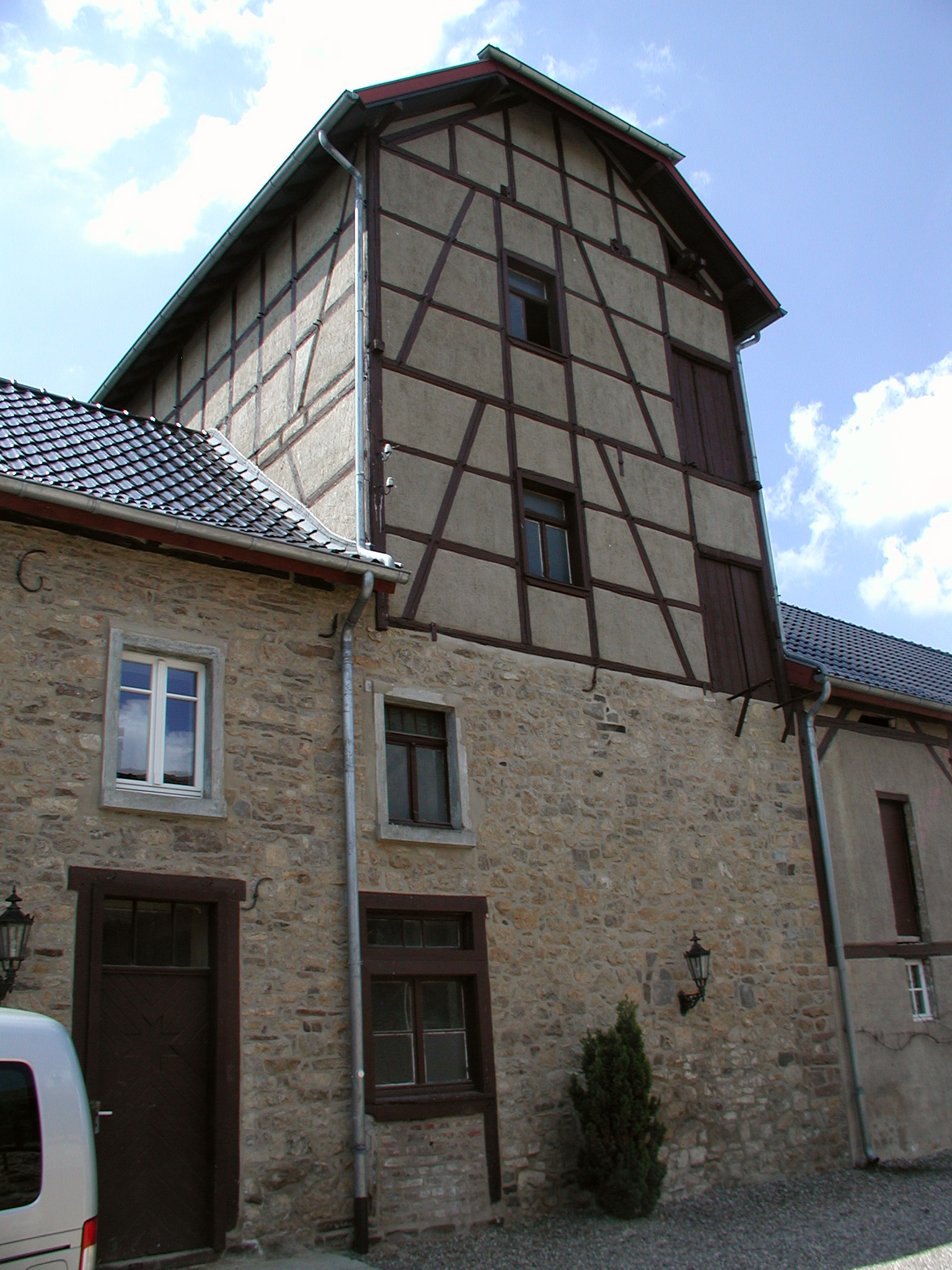 Bad Münstereifel Arloff. Die alte Mühle